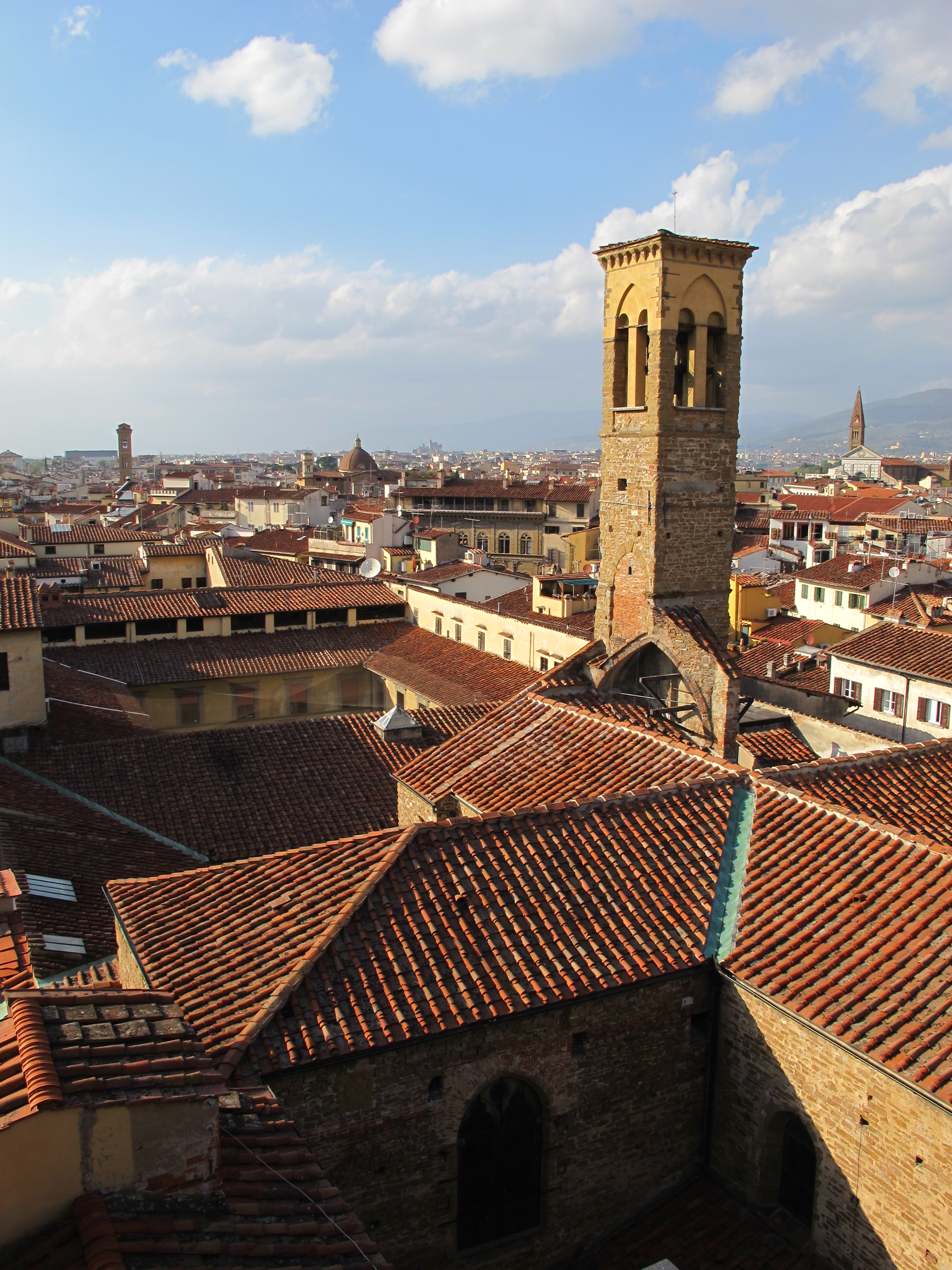 Hotel antica torre tornabuoni, terrazza, veduta s. trinita